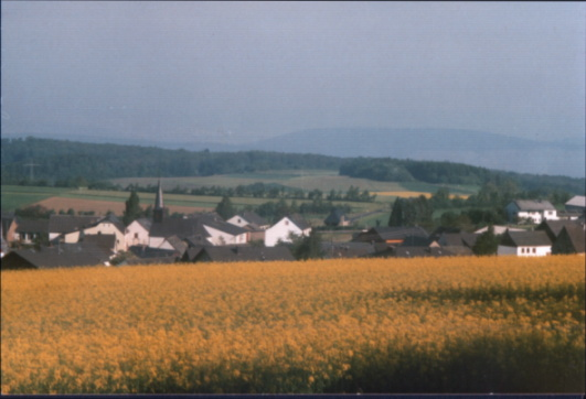 Blick über Gornhausen